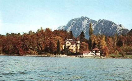 Waldschlössel in Burgau am Attersee / Gemeinde St.Gilgen